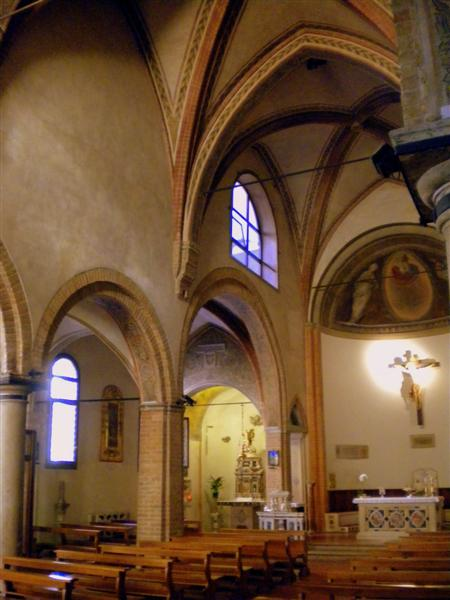 Interno della chiesa di San Nicolò a Padova